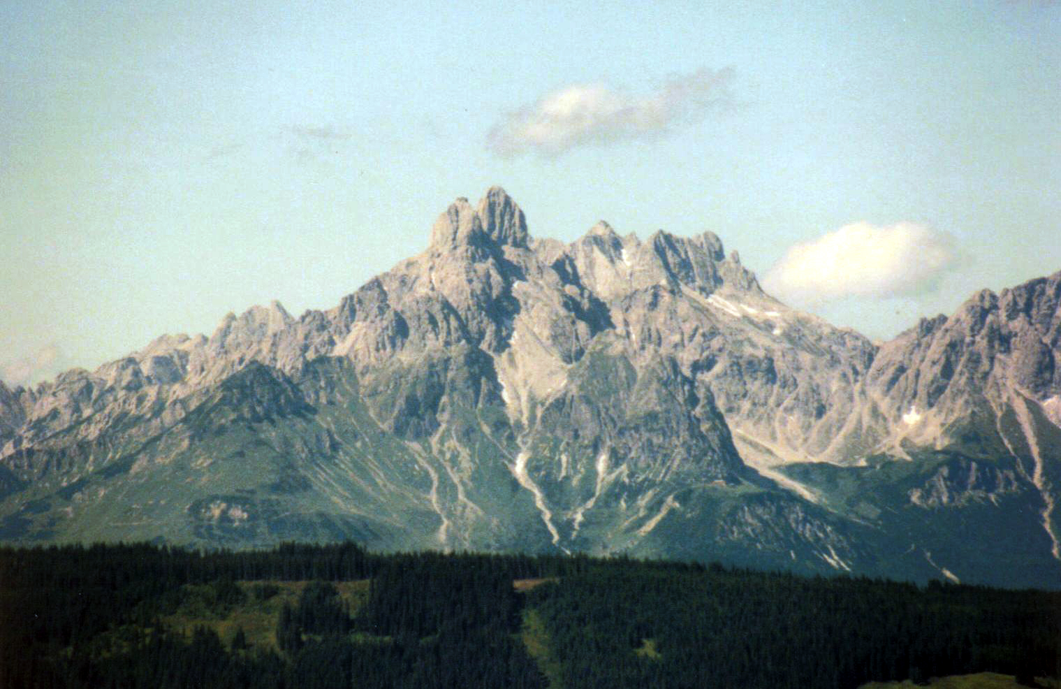 Ansicht der Bischofsmütze im Juli 1993 selbstfotografiert, GFDL